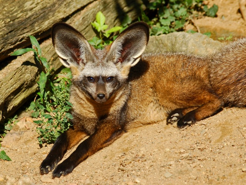 Canidae - Otocyon megalotis - Prague Zoo